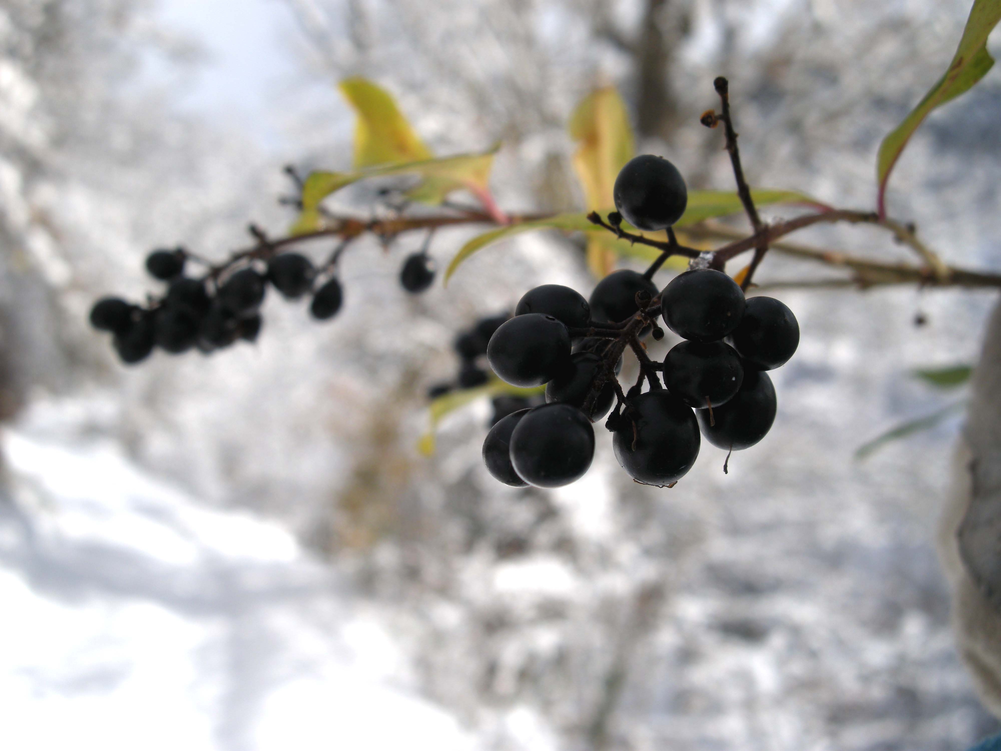 Ligustrum vulgare